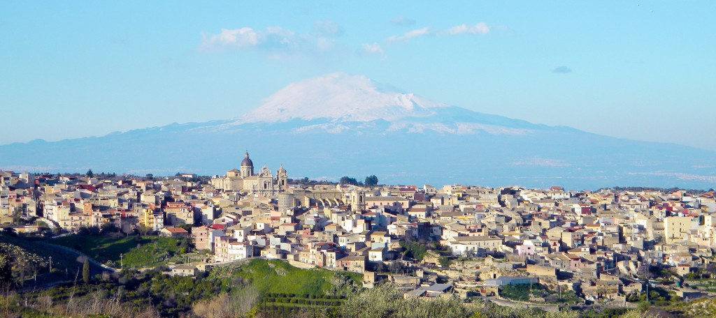 Veduta di Militello in Val di Catania